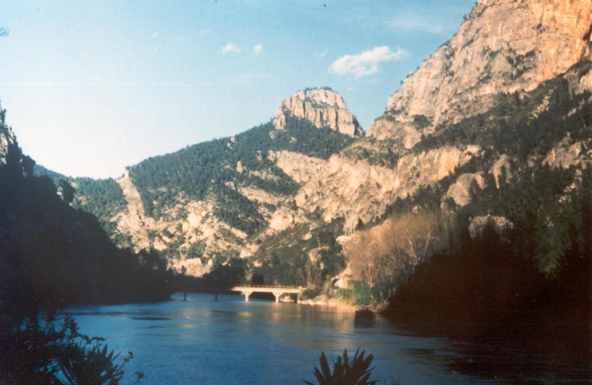 El Júcar entre Cofrentes y Tous atraviesa un profundo cañón, escalonado en represas sucesivas para la generación hidroeléctrica. La foto está tomada unos dos km aguas arriba de Millares (Millars). Autor: Fev. Fecha: marzo 1978.